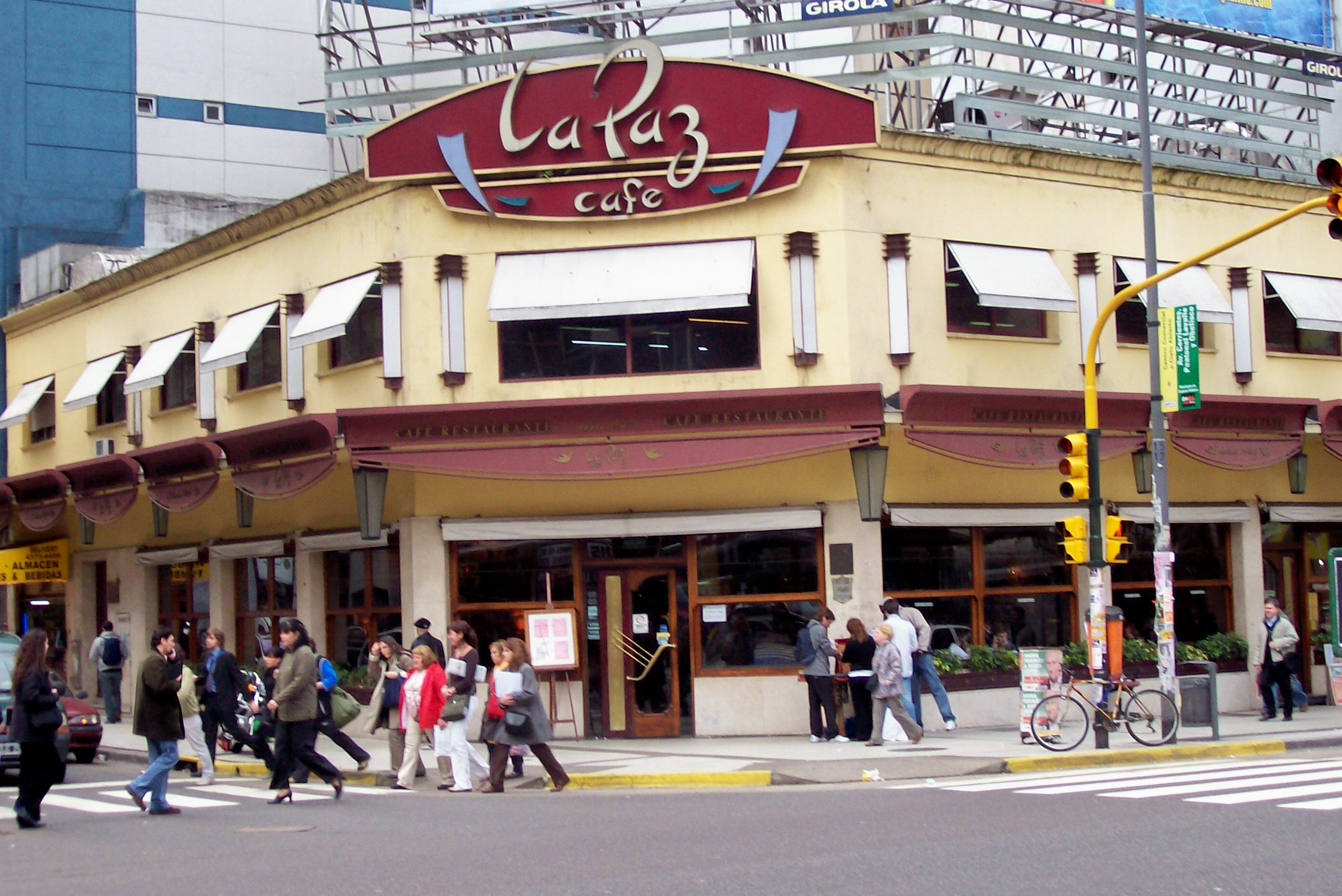 Avenida Corrientes y Montevideo, Café "La Paz" (Ciudad de Buenos Aires).